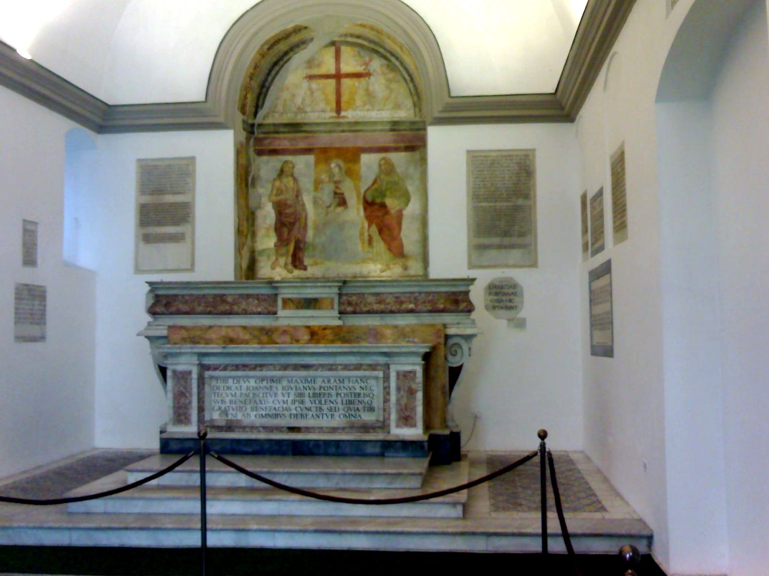 Cappella Pontano (Napoli). Altare